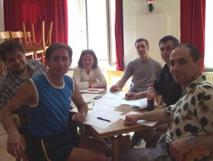 Teamo "Bukvarj" el Berlino, ludanta en "Kio?Kie?Kiam?" (propra foto, mi estas plej maldekstre sur la foto, iom en la fono).